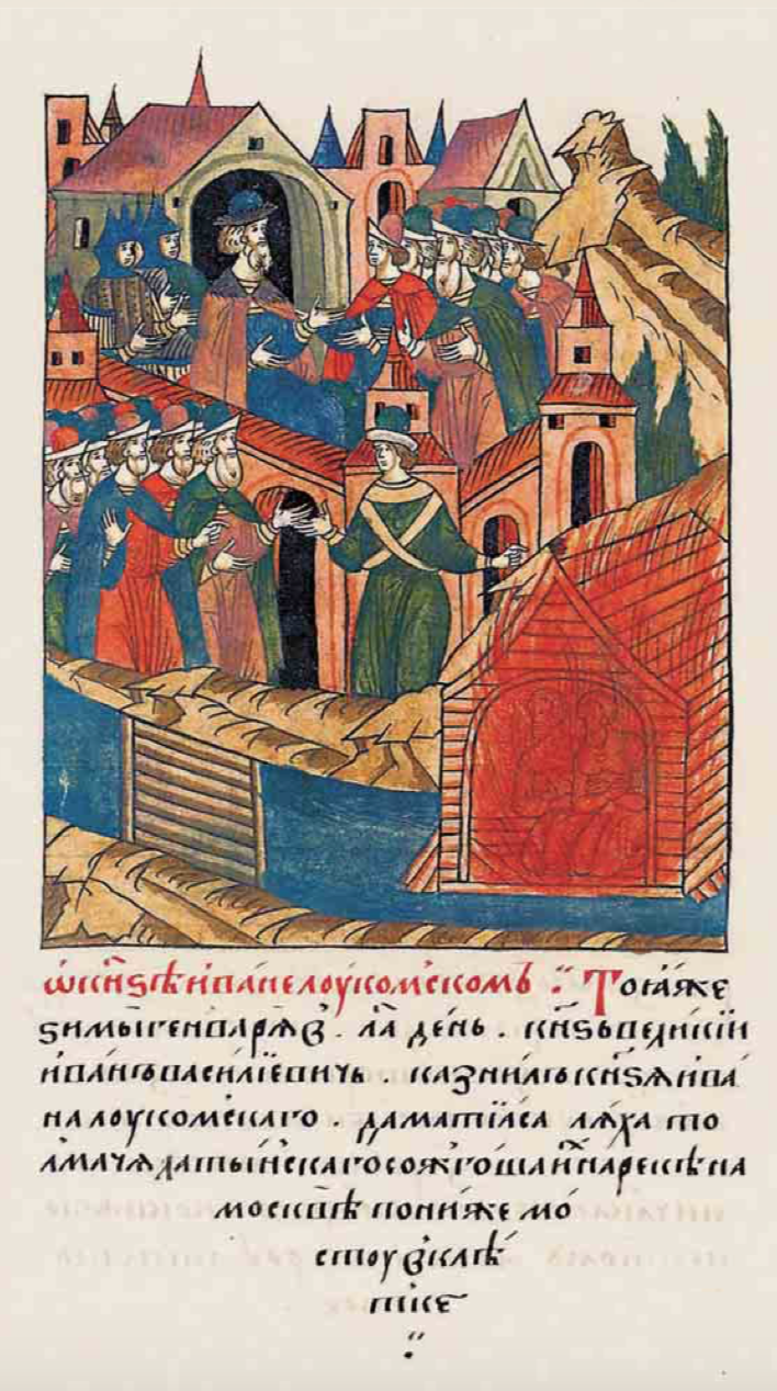 Лицевой летописный свод Ивана IV Грозного. О казни князя Иване Лукомского (1493)